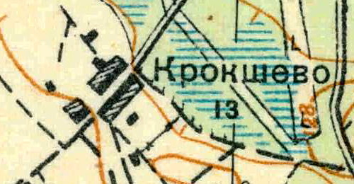 Топографическая карта Ленинградской области, квадрат О-35-24-А-б (Витино), деревня Крокшево